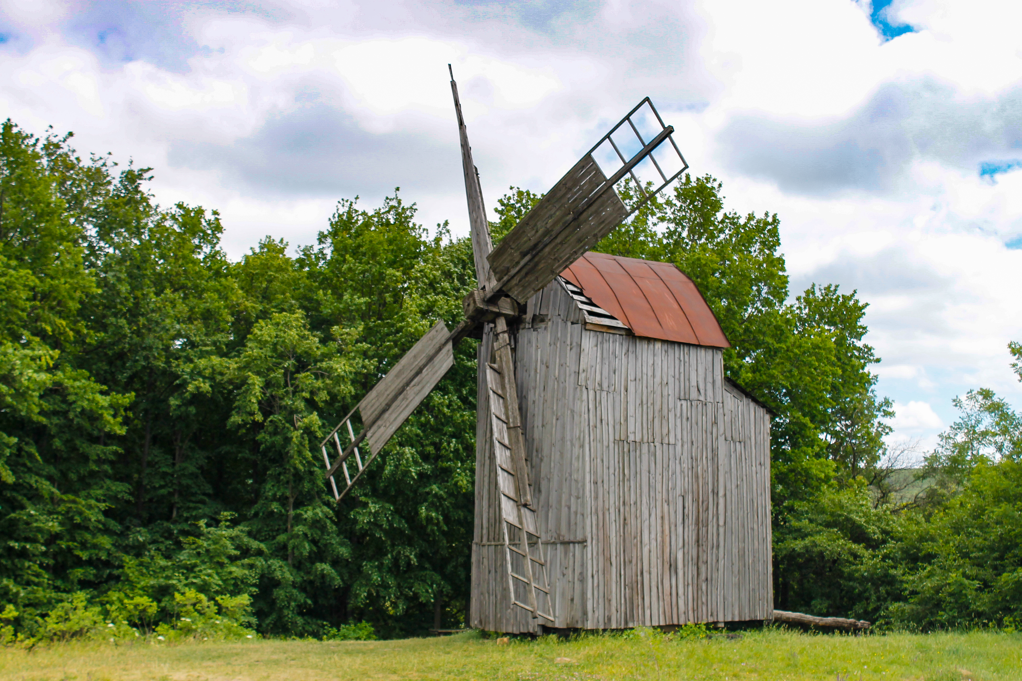 Вітряк, Івківці